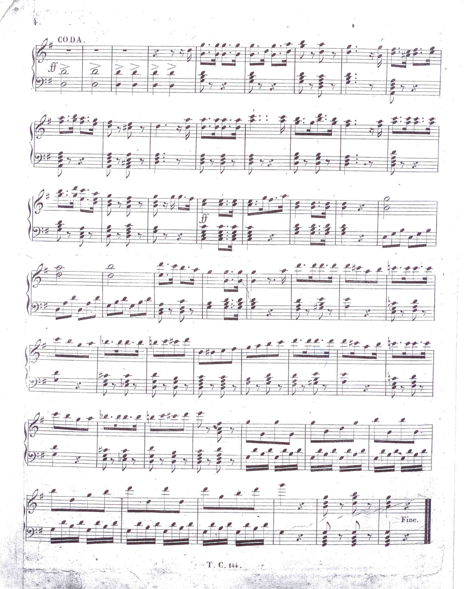 Troisième et dernière page d'une version pour piano du Galop des Tambours de Jean Baptiste Joseph Tolbecque, immense succès aux Carnavals de Paris 1839 et 1840. L'orchestre dirigé par le compositeur comptait 40 tambours.